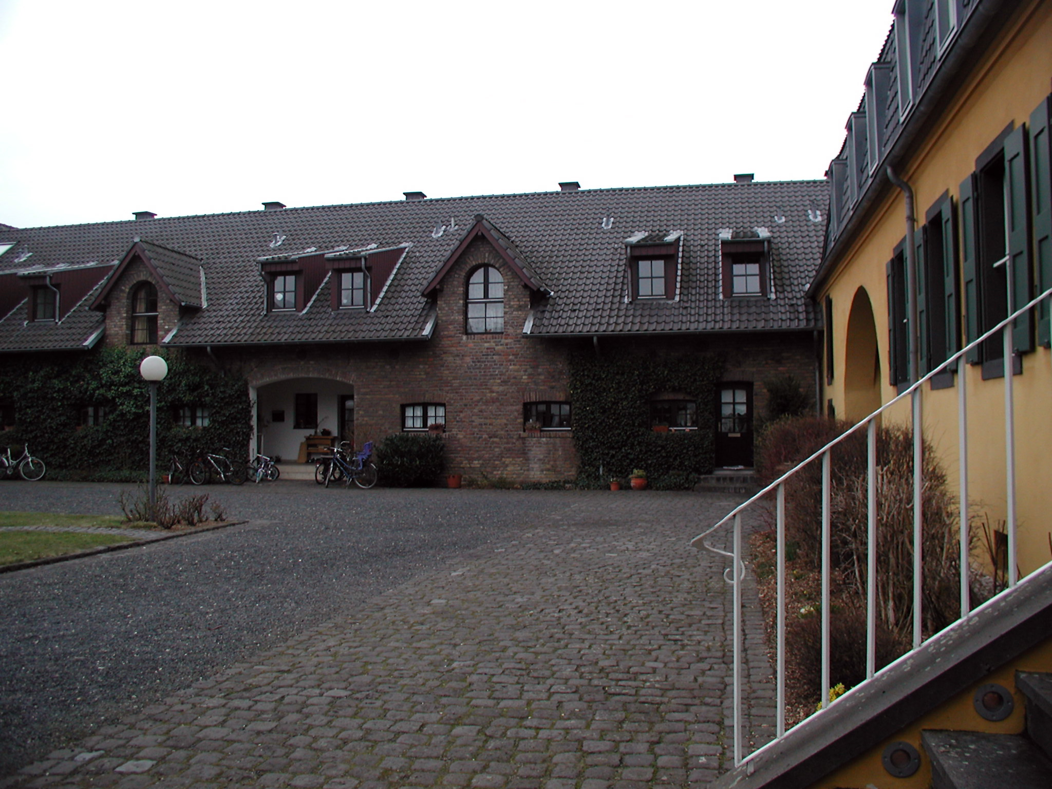 Palmersdorfer Hof, Brühl. Innenhof